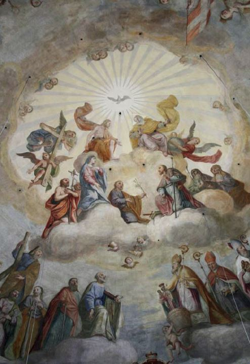 Ausschnitt aus dem Deckenfresko der Buchbacher Kirche: Die Heilige Dreifaltigkeit thront über der Mutter Gottes und dem Kirchenpatron Jacobus dem Älteren mit dem Pilgerstab und dem Schwert, mit dem er enthauptet wurde. Schräg darunter entdeckt man St. Rupertus mit dem Salzfass, den Patron der Salzburger Kirchenprovinz, zu der einst auch Buchbach gehört hat. Er hält als zusätzliches Attribut die Statue der Gottesmutter von Altötting – ein Anachronismus, Rupertus lebte im 8. Jahrhundert, die Skulptur der „Schwarzen Madonna“ entstand erst rund 700 Jahre später